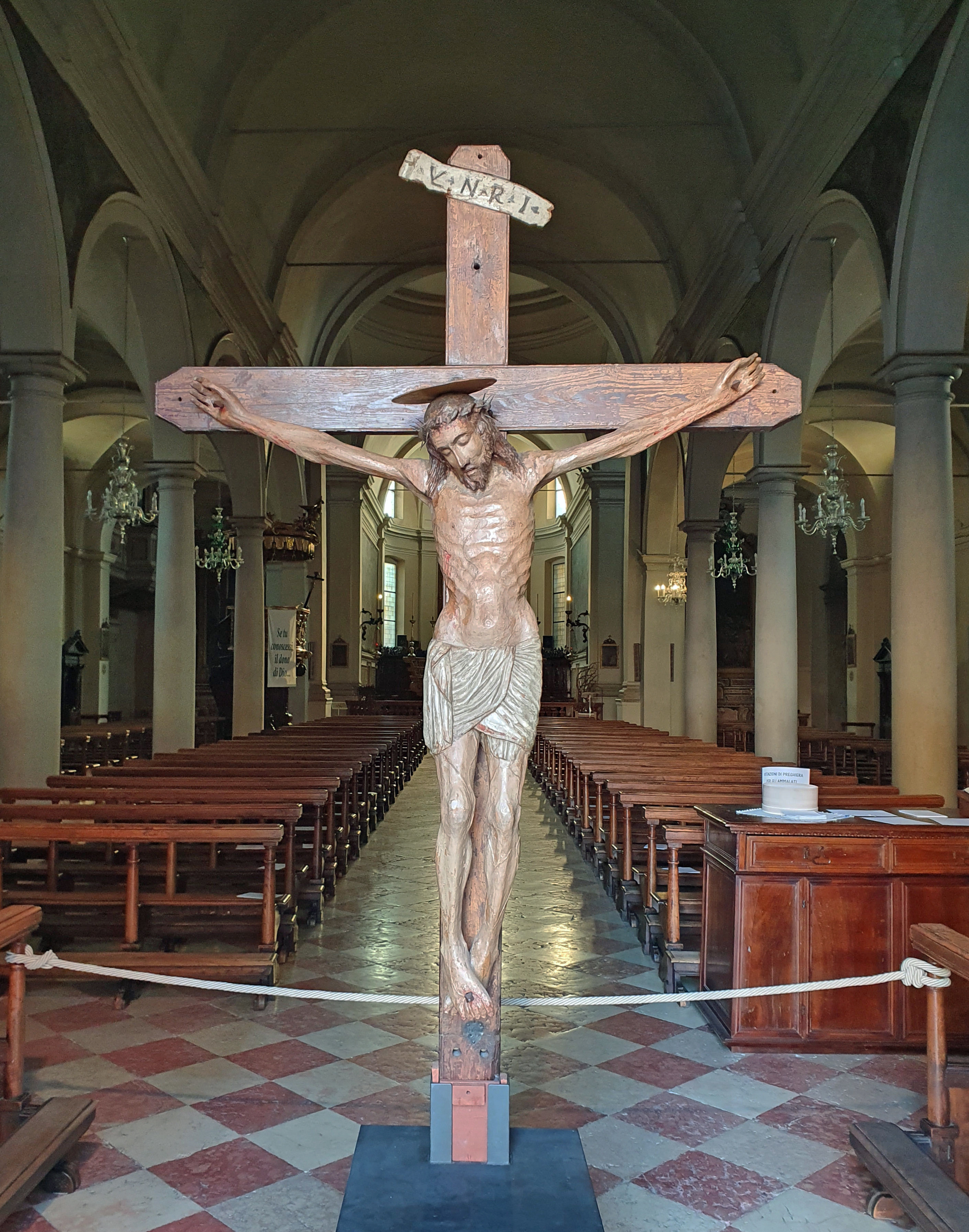 Castel Goffredo-Crocifisso di S. Erasmo